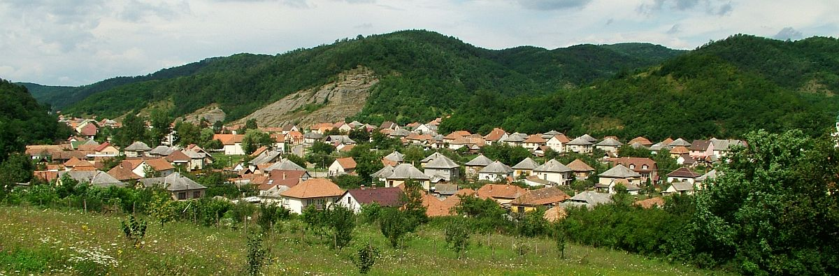 Istenmezeje - Panorámafotó